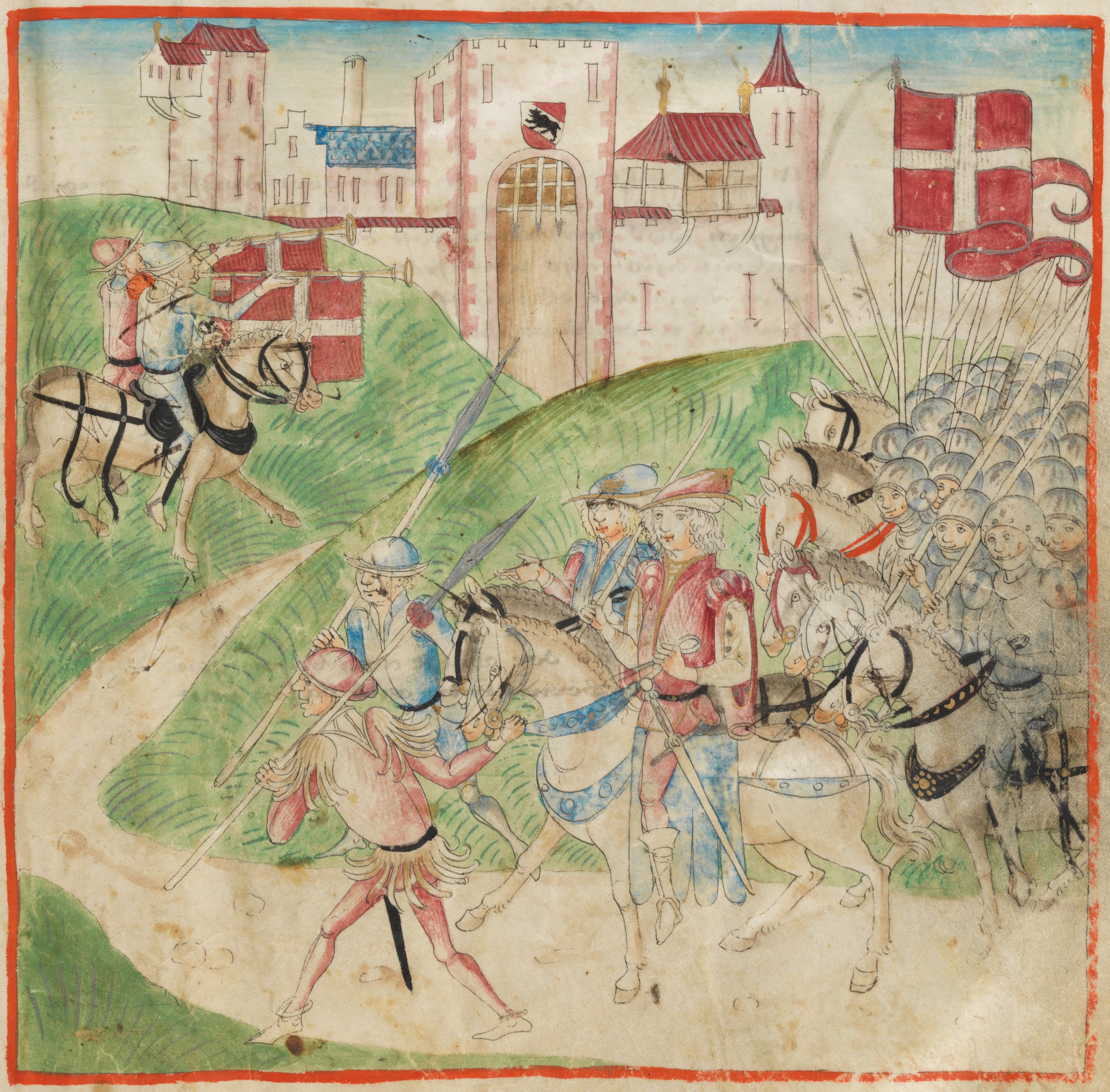 Savoyarden mit Schefflin zu Fuß. Amtliche Berner Chronik Teil 2, Diebold Schilling der Ältere, 1478-1483, Bern, Burgerbibliothek, Mss.h.h.I.2, S. 5 (Ausschnitt)